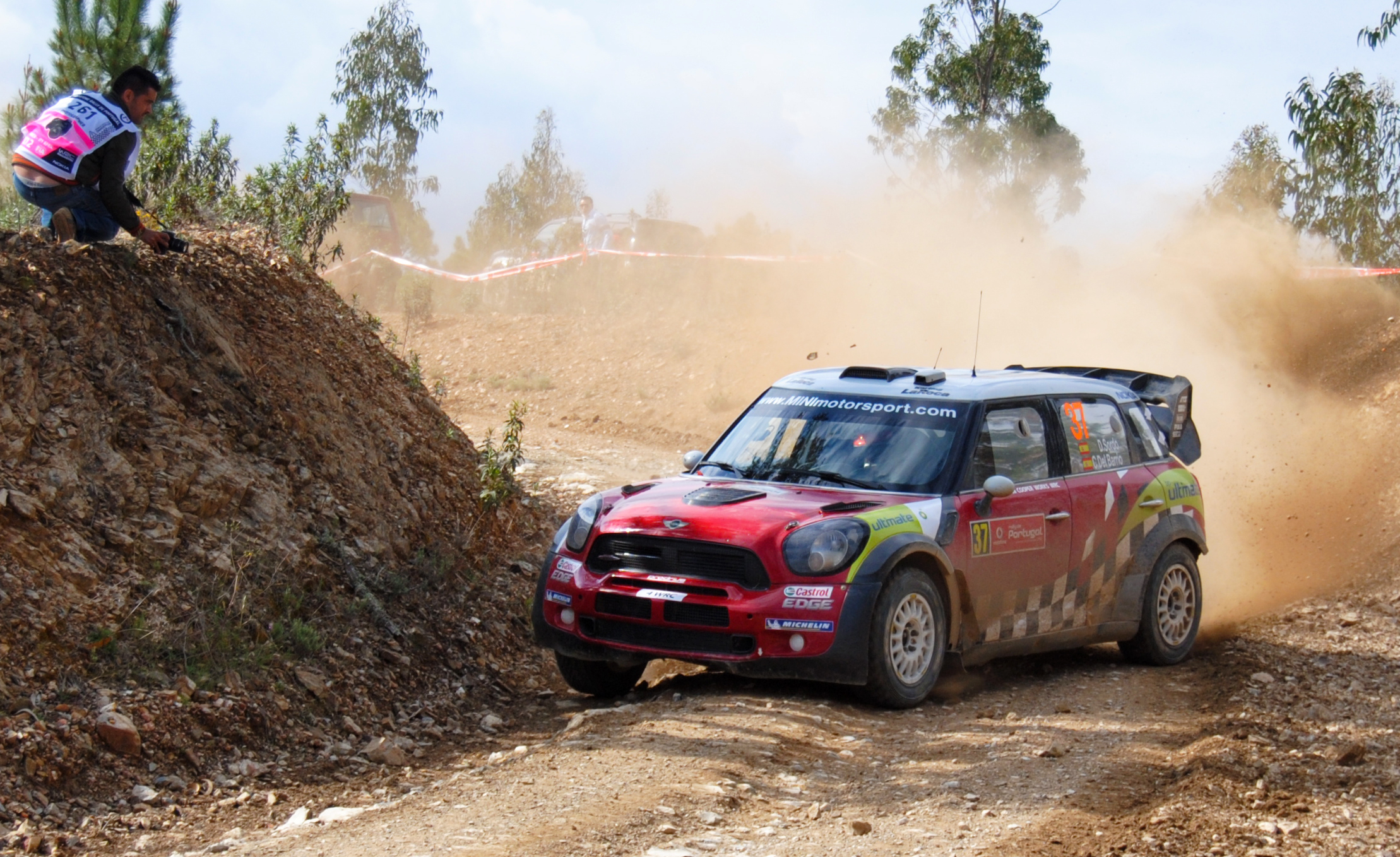 Daniel Sordo/ Carlos del Barrio Rally de Portugal 2012